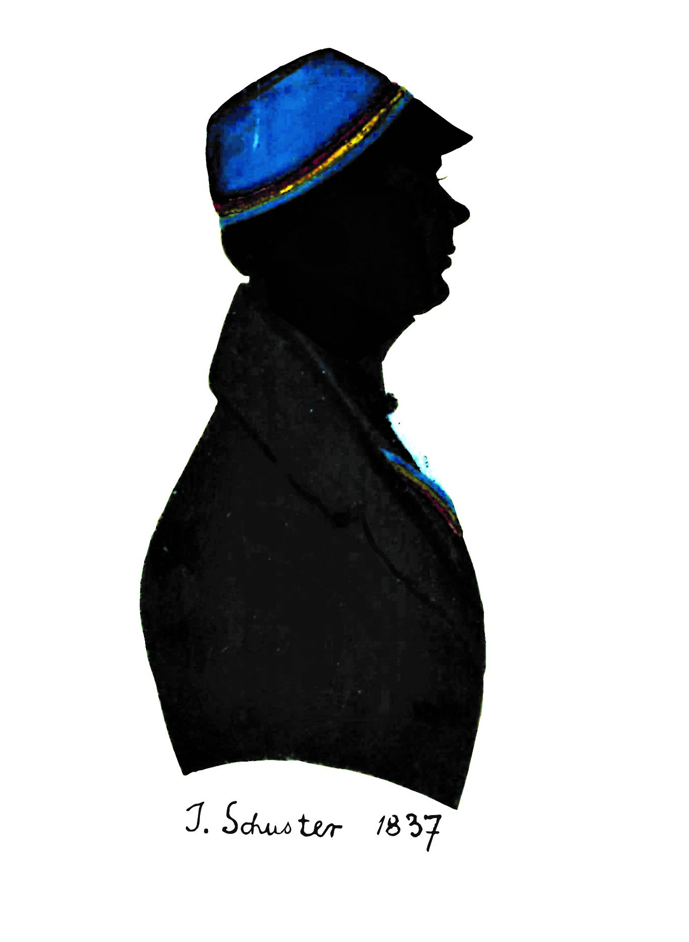 Silhouette von Julius Schuster als Corpsburschen der Lusatia Leipzig.